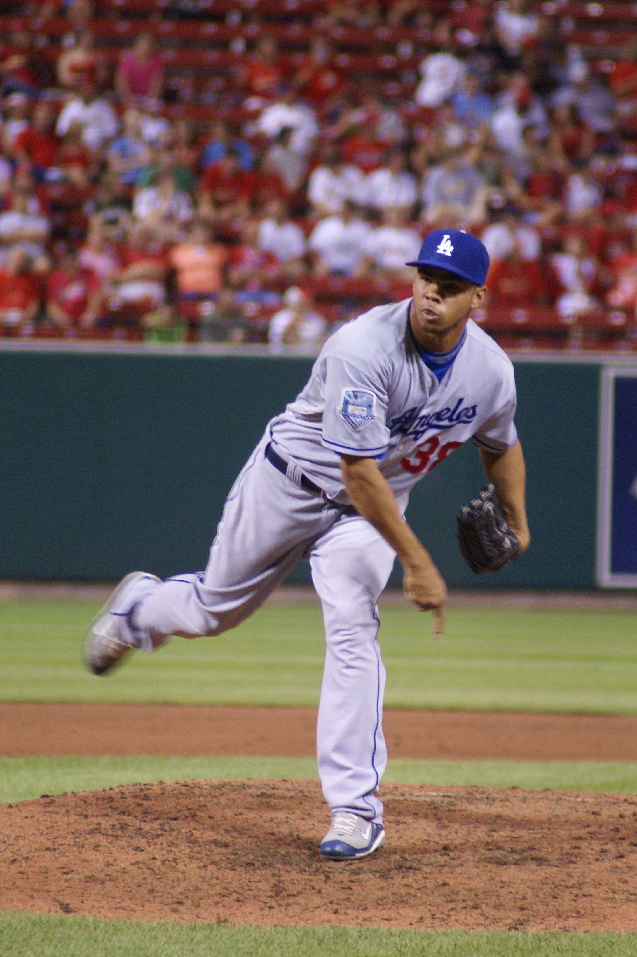 Ramón Troncoso